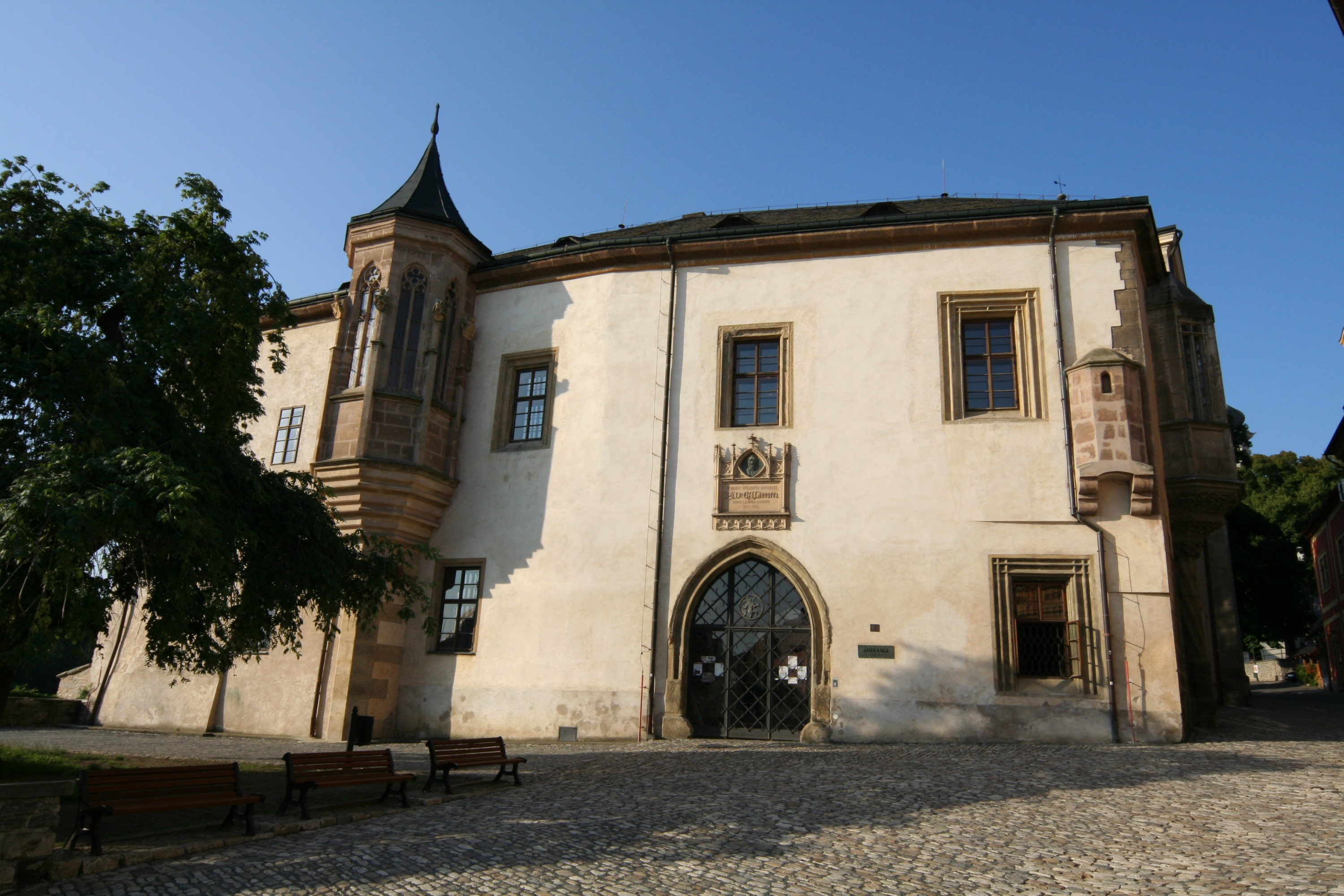 ČMS Hrádek